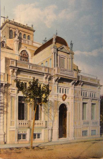 Palacio D'Amico, construido en 1887. Sede del Arzobispado de La Plata desde 1907.